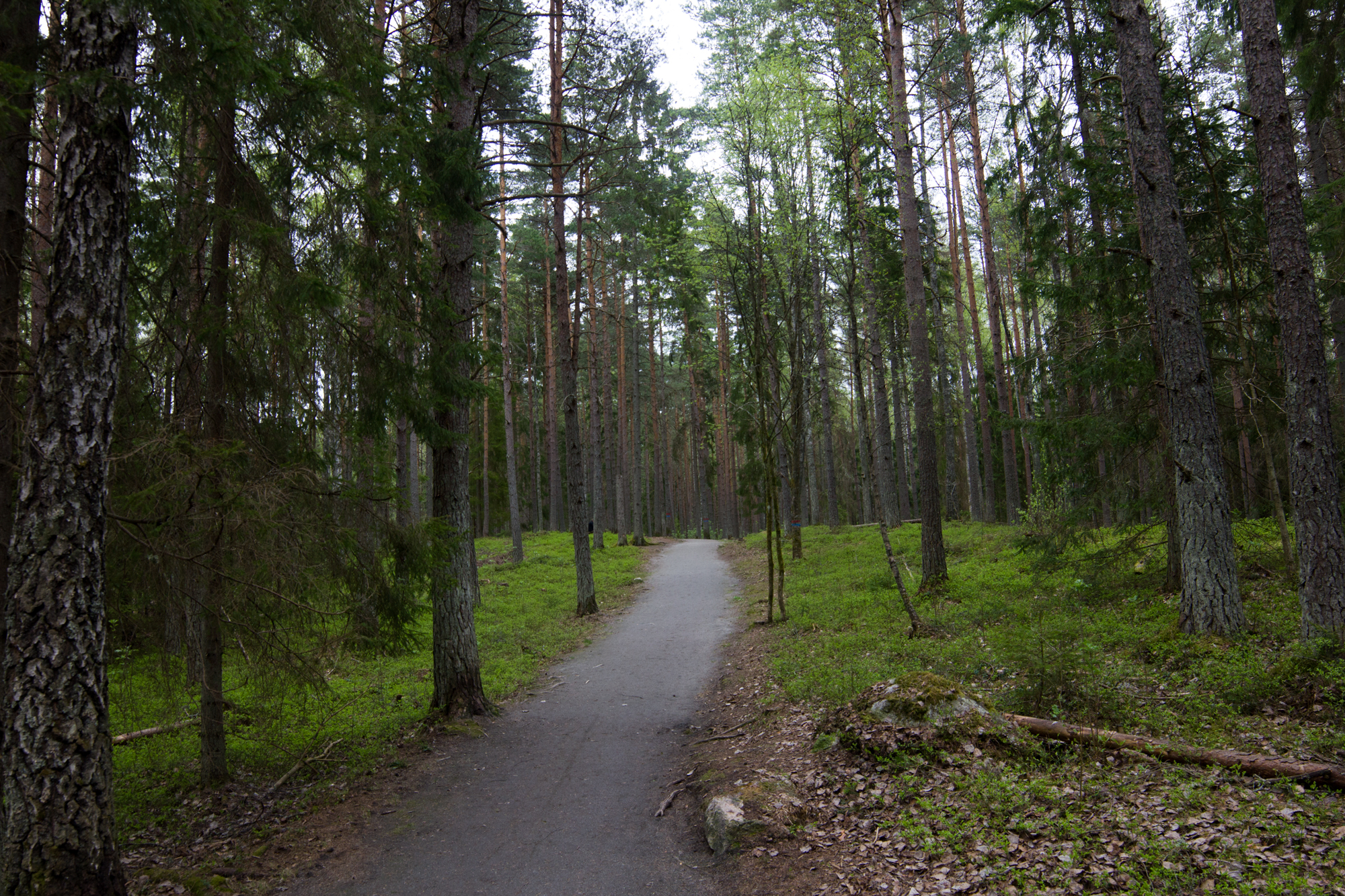 Stig i Varbergaskogen, Örebro.